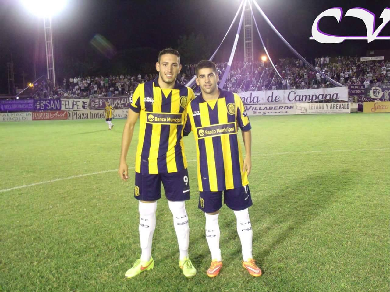 Vara en Central